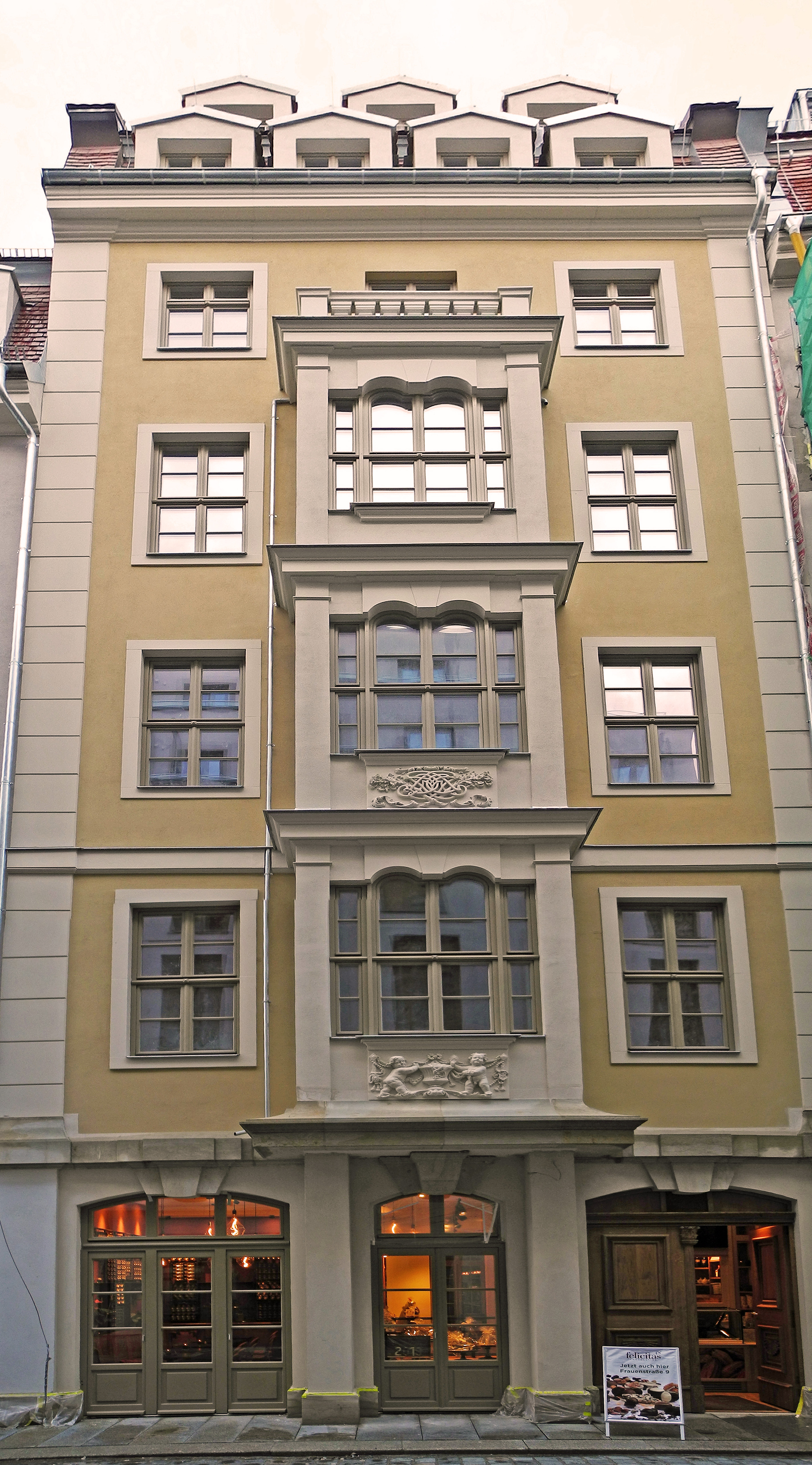 Das Dinglingerhaus in Dresden, Frauenstraße 9 (mittlerer Teil), errichtet um 1700 für den Hofgoldschmied Johann Melchior Dinglinger (1664–1731), rechts neben dem Klepperbeinschen Haus. Es wurde 1945 zerstört und 2018 wieder aufgebaut, siehe [1] und [2].